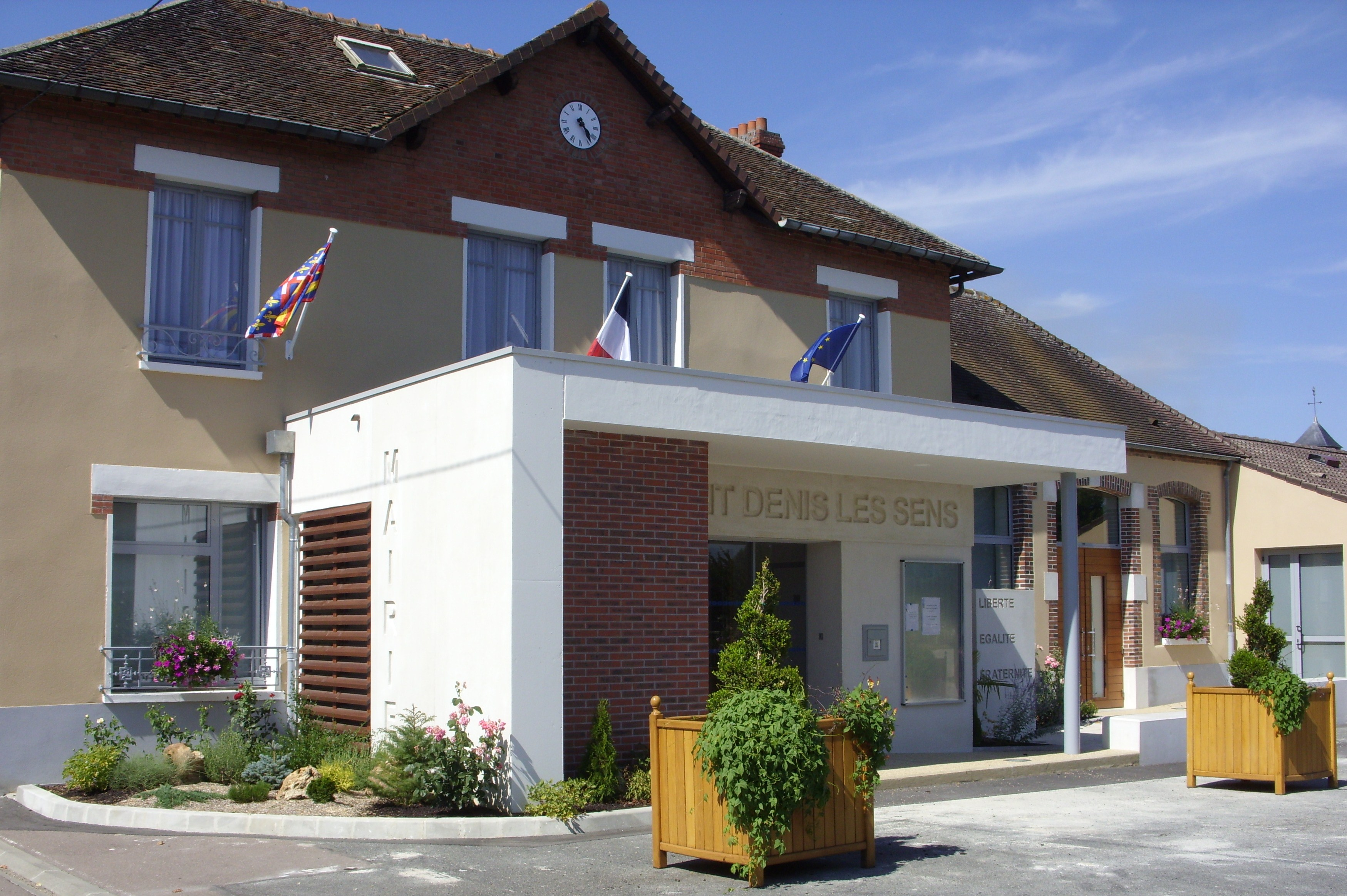 mairie